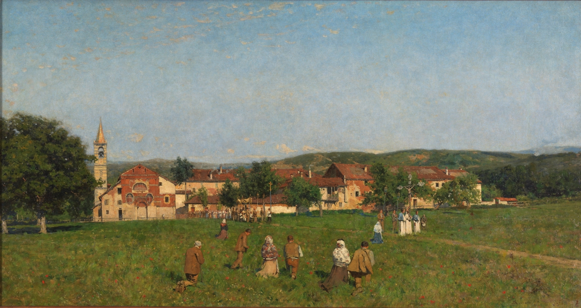 La obra representa una procesión religiosa en los alrededores de la Abadía de Santa Maria alla Croce, en Italia.